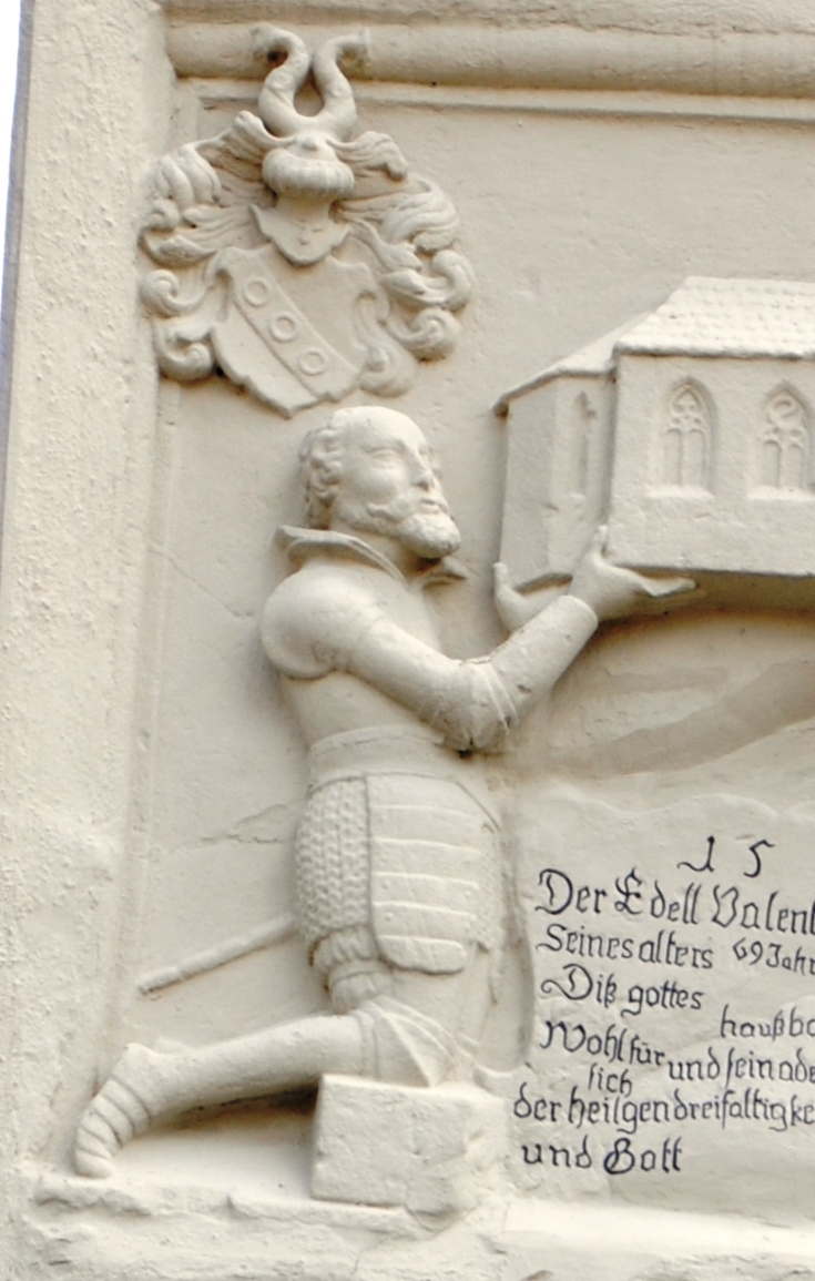 Valentin Echter als Kirchenstifter, Relief, Wappen St. Laurentius Schwarzenau